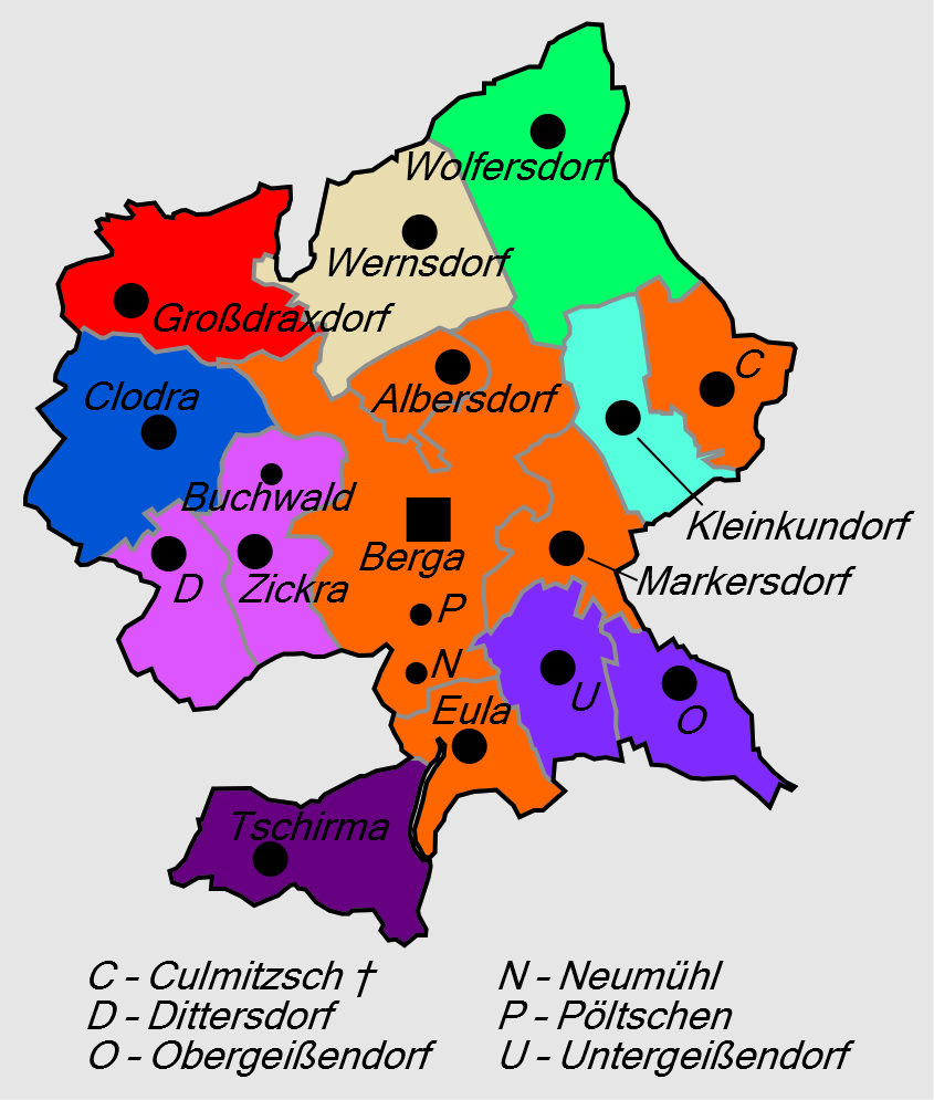 Gliederung der Stadt Berga/Elster ab 15. Juli 1968